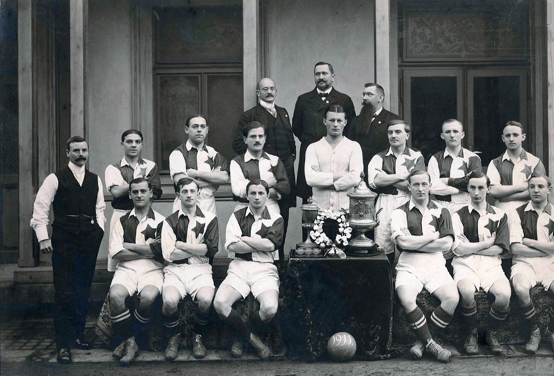 Mužstvo Slavie v roce 1911. Sedící: Široký, Medek Jaroslav, Benda Eman., Košek Jenda, Starý Jenny, Bohata Otokar. Stojící I.řada: Madden (trenér), Šroubek, Macoun Gustav, Krümer Karel, Romováček Jiří, Veselý Ríša, Holý, Rosmaisl Frant. II. řada: Dr. Ladislav Mattuš, inž. Zd. Kruliš starosta, archit. Roháček.